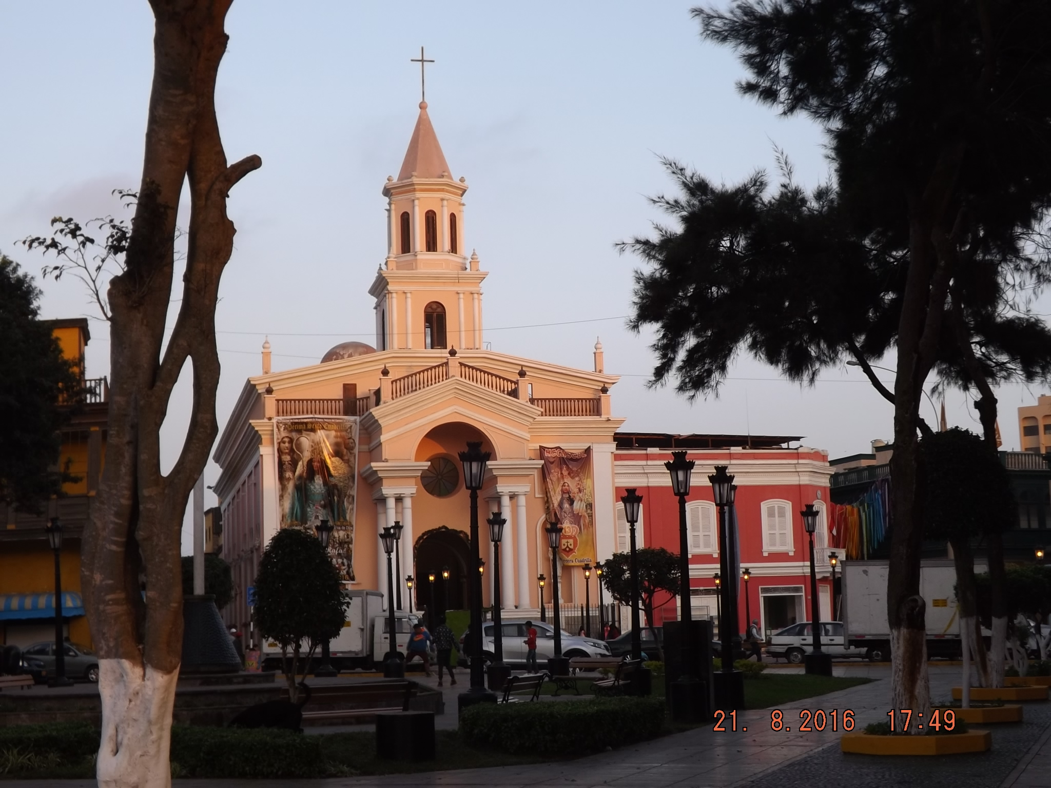 Principal iglesia del puerto del Callao